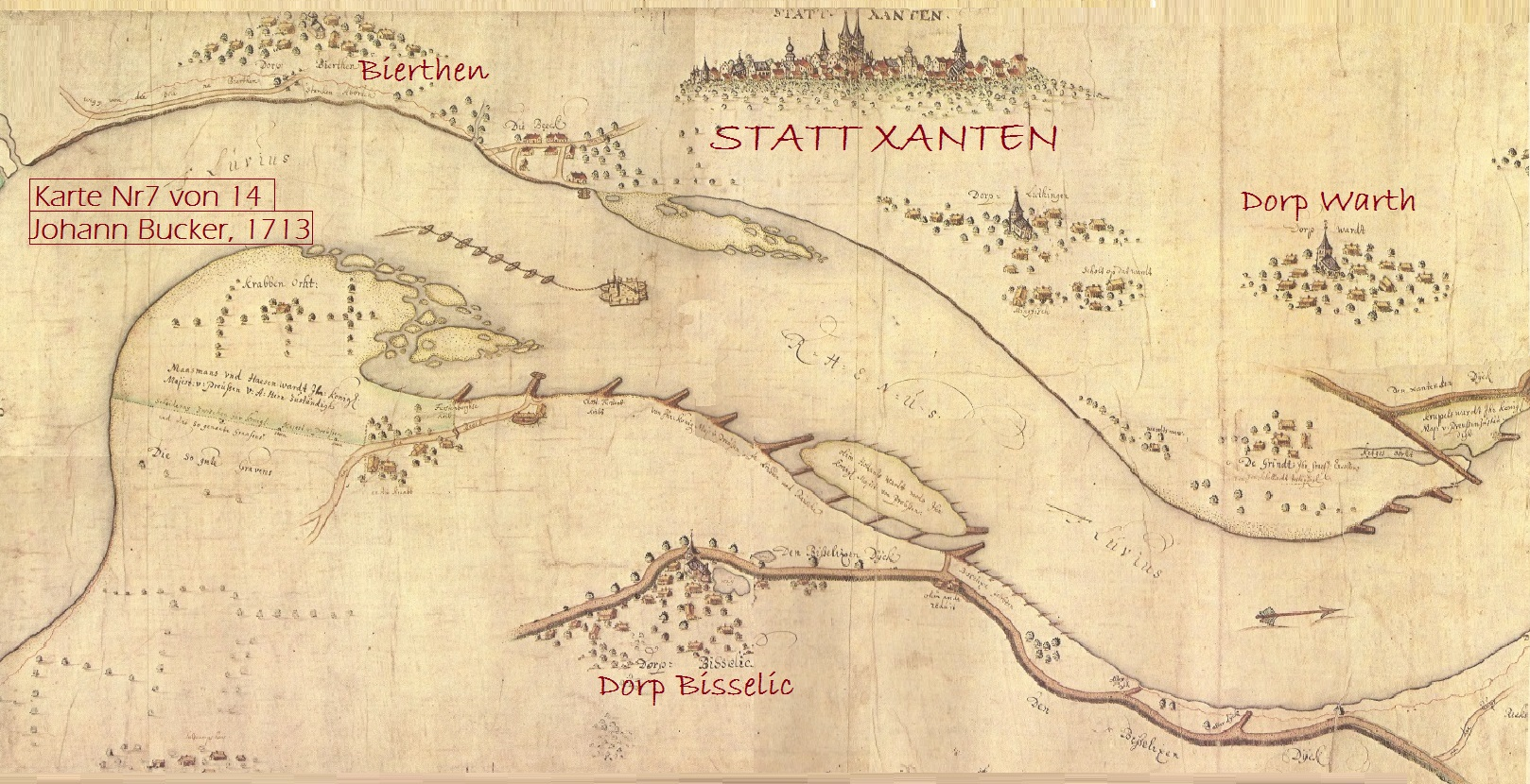 Bucker-Karte Nr. 7 von 14 – Rheinverlauf bei Xanten; Bereich der heutigen Bislicher Insel